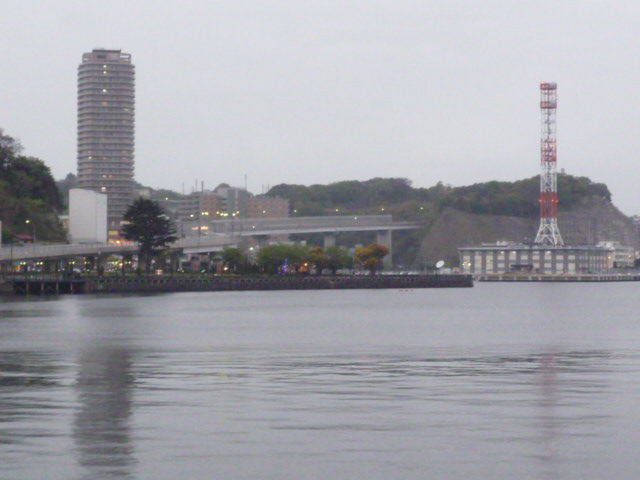 本町山中有料道路を撮影、背後の高層ビルは「ウェルシティ横須賀」